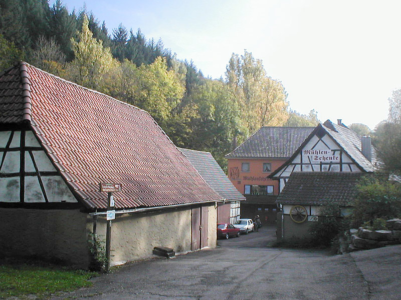 Schnepfenhardter Mühle im Fünfmühlental bei Bad Rappenau, Baden-Württemberg, Deutschland